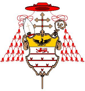 Stemma del Cardinale Benedetto Erba Odescalchi, Arcivescovo di Milano.